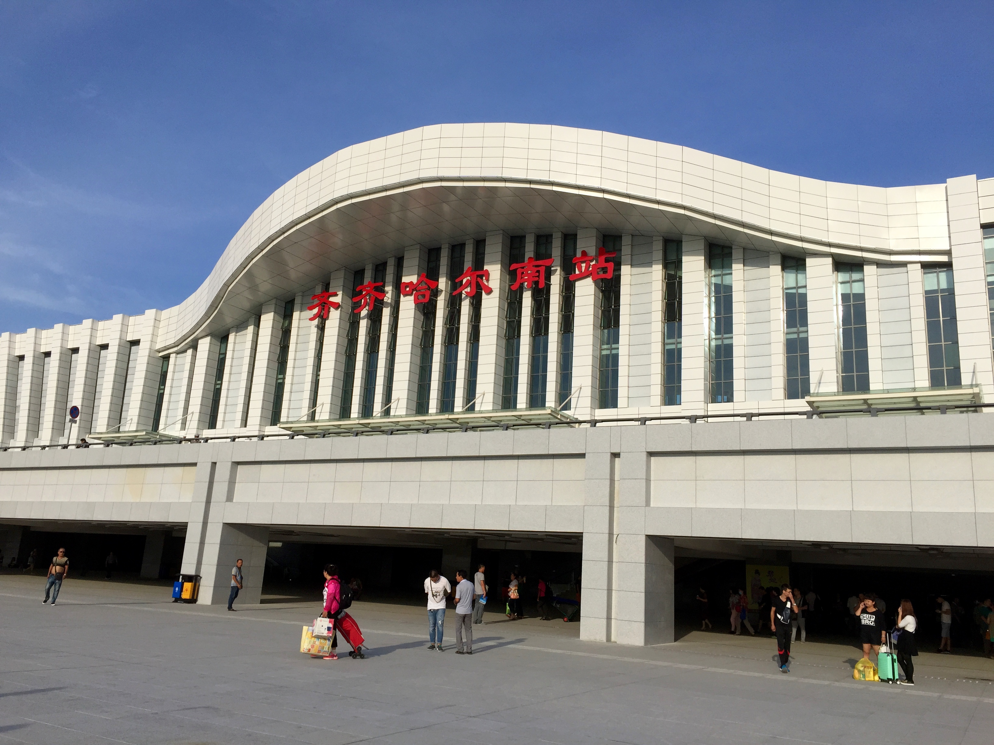 齐齐哈尔高铁站